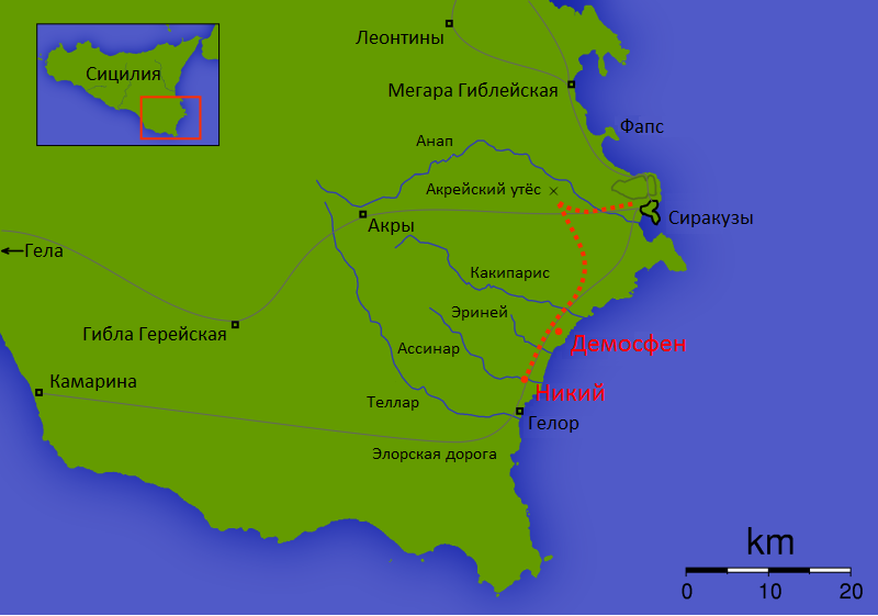 Русифицированная версия